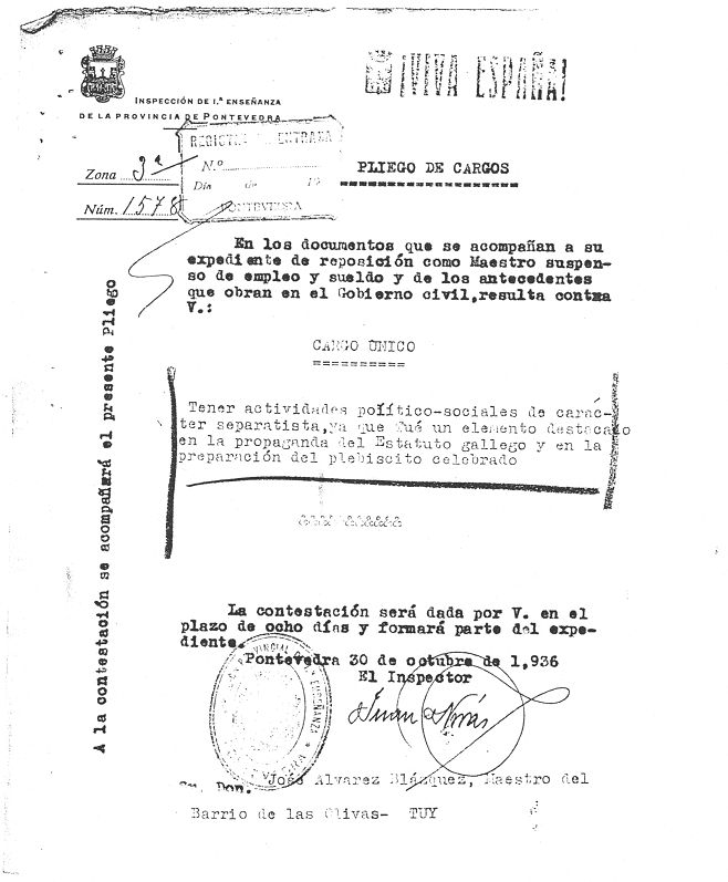 ¡VIVA ESPAÑA! INSPECCIÓN DE 1.ª ENSEÑANZA DE LA PROVINCIA DE PONTEVEDRA Zona 3ª Núm. 1578 PLIEGO DE CARGOS En los documentos que se acompañan a su expediente de reposición como Maestro suspenso de empleo y sueldo y de los antecedentes que obran en el Gobierno civil, resulta contra V.: CARGO ÚNICO Tener actividades político-sociales de carácter separatista, ya que fue un elemento destacado en la propaganda del Estatuto gallego y en la preparación del plebiscito celebrado &&&&&&&&& La contentación será dada por V. en el plazo de ocho días y formará parte del expediente. Pontevedra 30 de octubre de 1.936 El Inspector Juan Xxxx? Sr. D. José Álvarez Blázquez, Maestro del Barrio de las Olivas- TUY A la contestación se acompañará el presente pliego Para contextualizar el presente documento véase: Depuración franquista del magisterio español